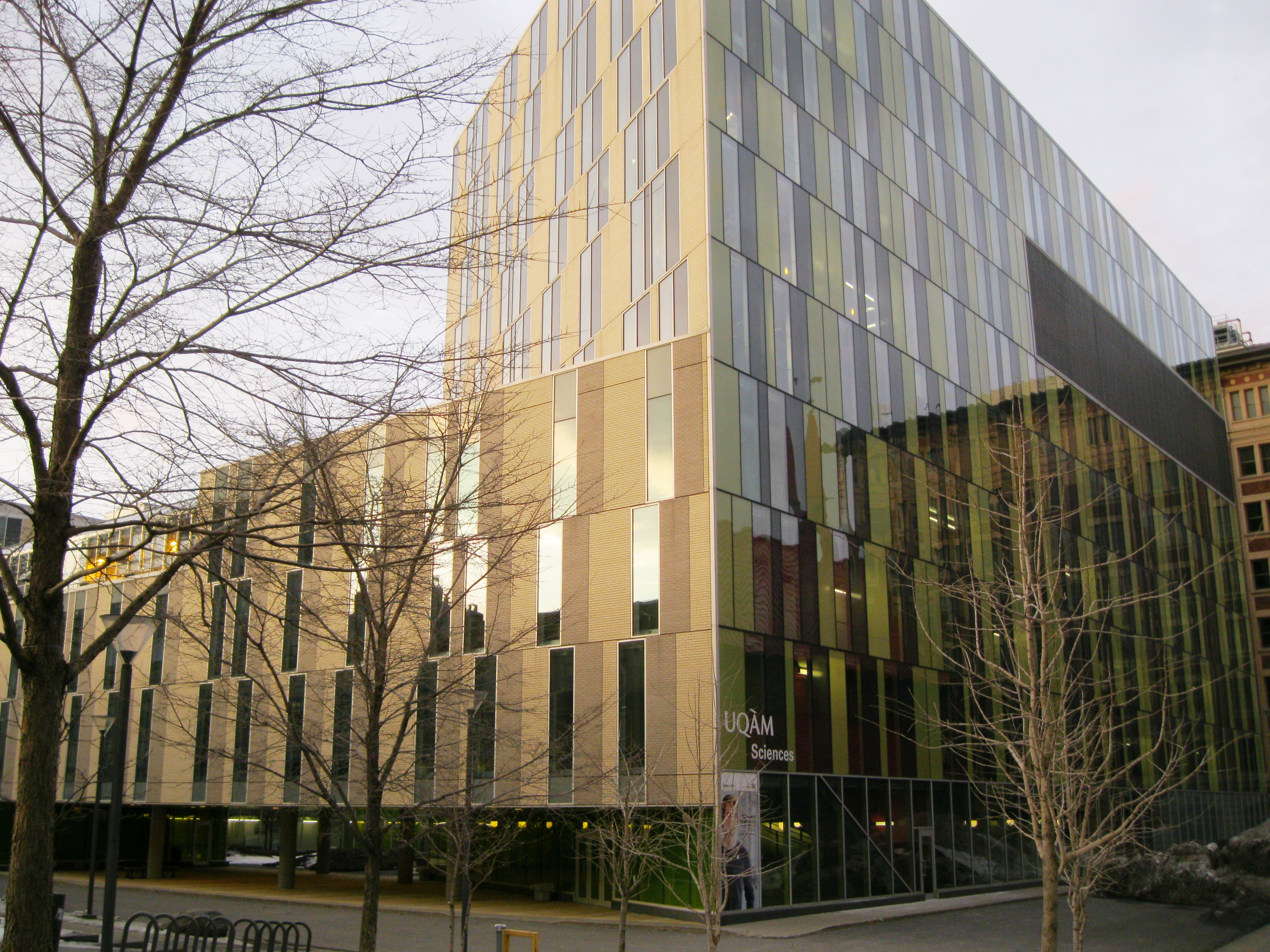 Pavillon des Sciences biologiques (SB), Université du Québec à Montréal, 141, avenue du Président-Kennedy, Montréal, H2X 1Y4. Il fait partie du Complexe des sciences Pierre-Dansereau.